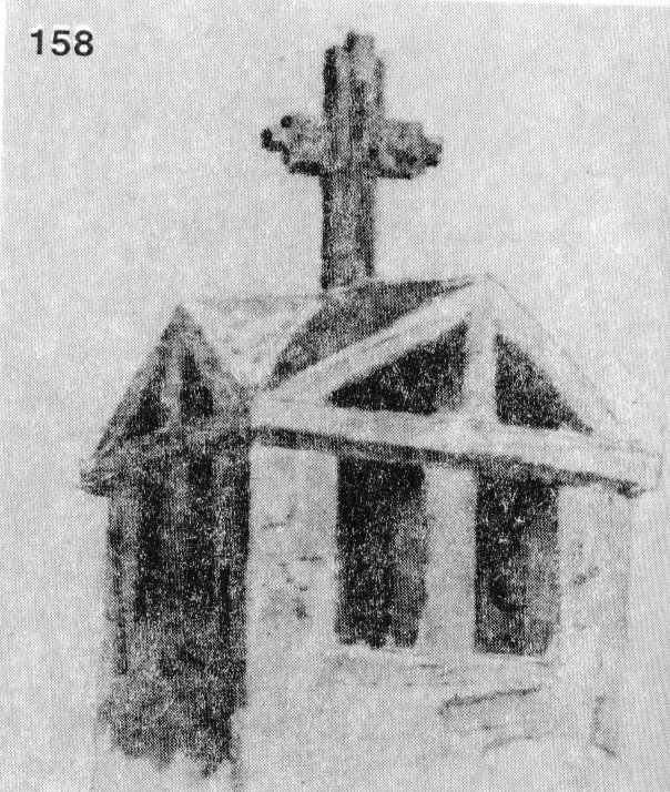 158. Комин с кръст от с. Орешене, Тетевенско. Дървен, четирикрилен, забит в мазилката на покриве на комина с долното си по-дълго крило. Горните му крила са равни помежду си и завършват с по една малка шапчица. Приблизителни размери: 30x18x3 см. Скициран на 19.VII.1916 г. (Т. 7, обр. 40.)